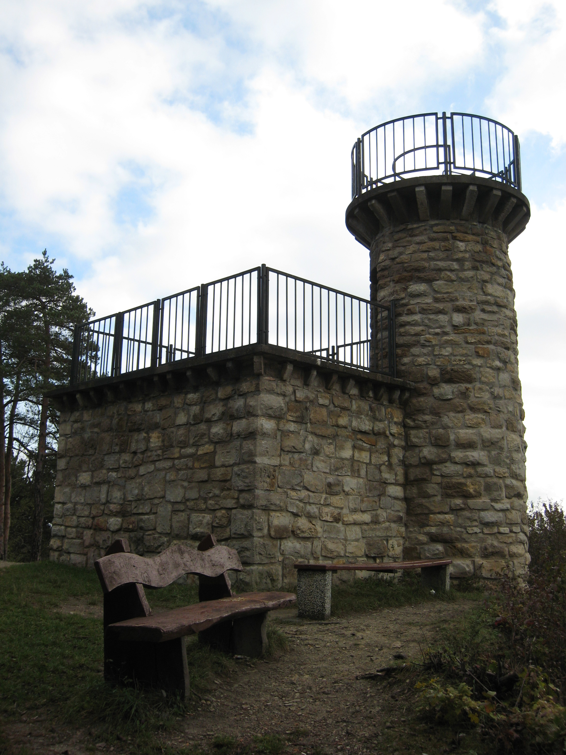 Kreuzchen Arnstadt 2